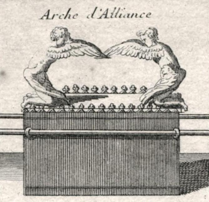 Arce_d'Alliance. From: Carte du voïage des Israëlites dans le désert depuis leur sortie de l'Egipte jusqu'au passage du Jourdain, dressé par l'auteur du commentaire de l'Exode et / exécutée par Liébaux, géografe.